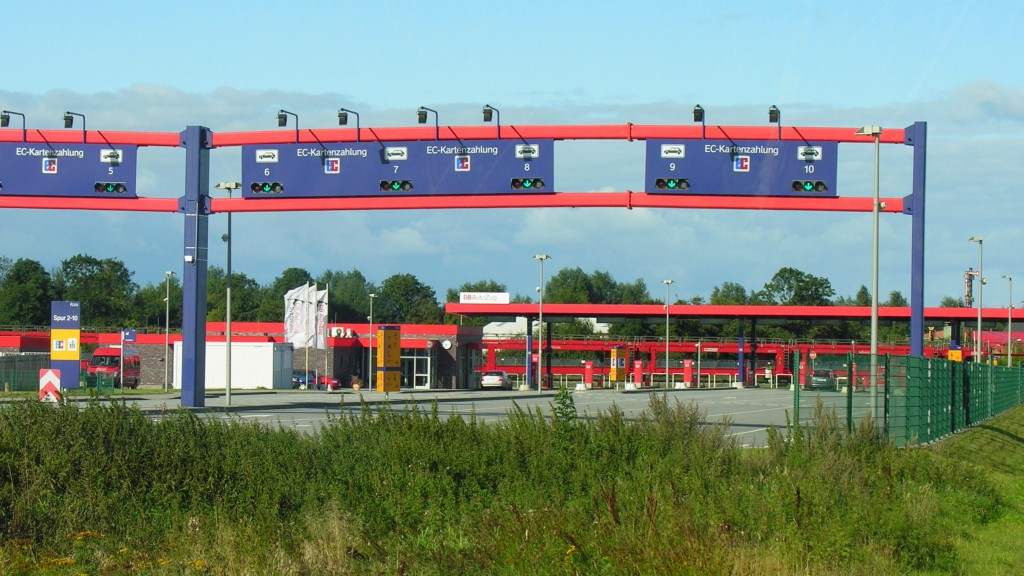 Niebüll Verladestation DB Autozug Sylt Shuttle Terminal Foto 2007 Wolfgang Pehlemann Wiesbaden DSCN6142